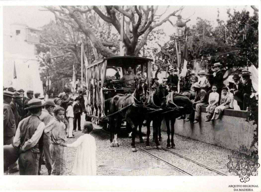 Carro Americano no Largo da Constituição Fotografia de 1910 (c.) Fotografia do Arquivo Regional da Madeira. Atual Largo da Restauração, Funchal, ilha da Madeira. Ao fundo o baluarte do Castanheiro da fortaleza de São Lourenço ainda com o cunhal completo, que foi amputado em 1916.